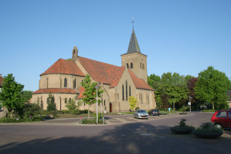 R.K. Kerk Parochie H.Plechelmus in Rossum(OV)